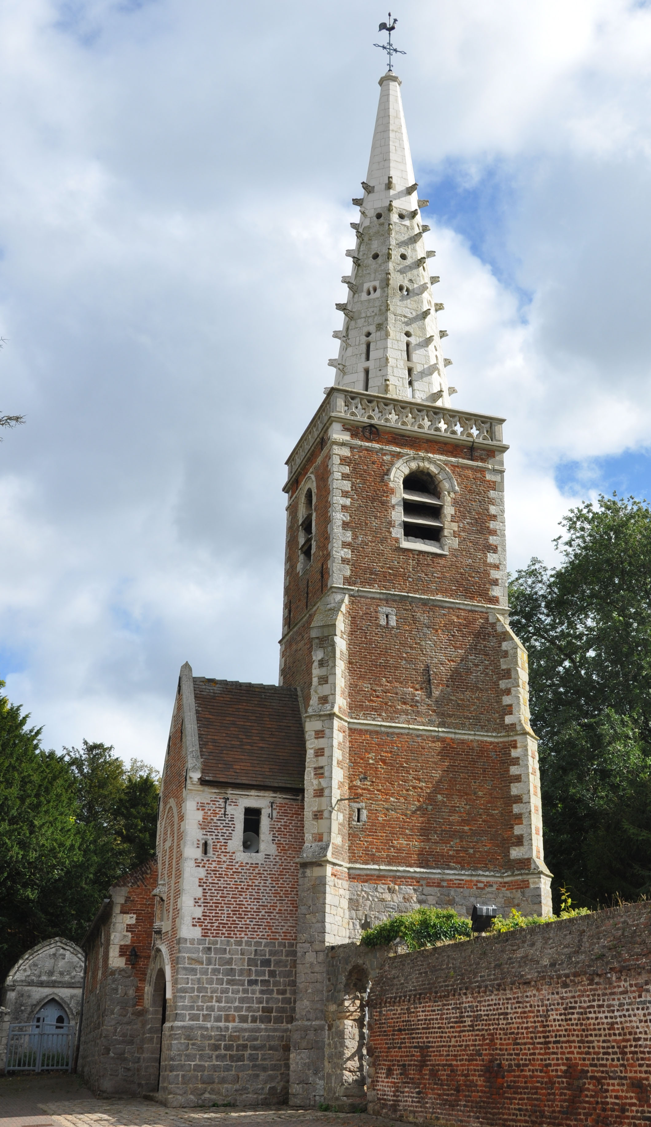 Église Notre-Dame de Vaudricourt, (Inscrit, 1946) .